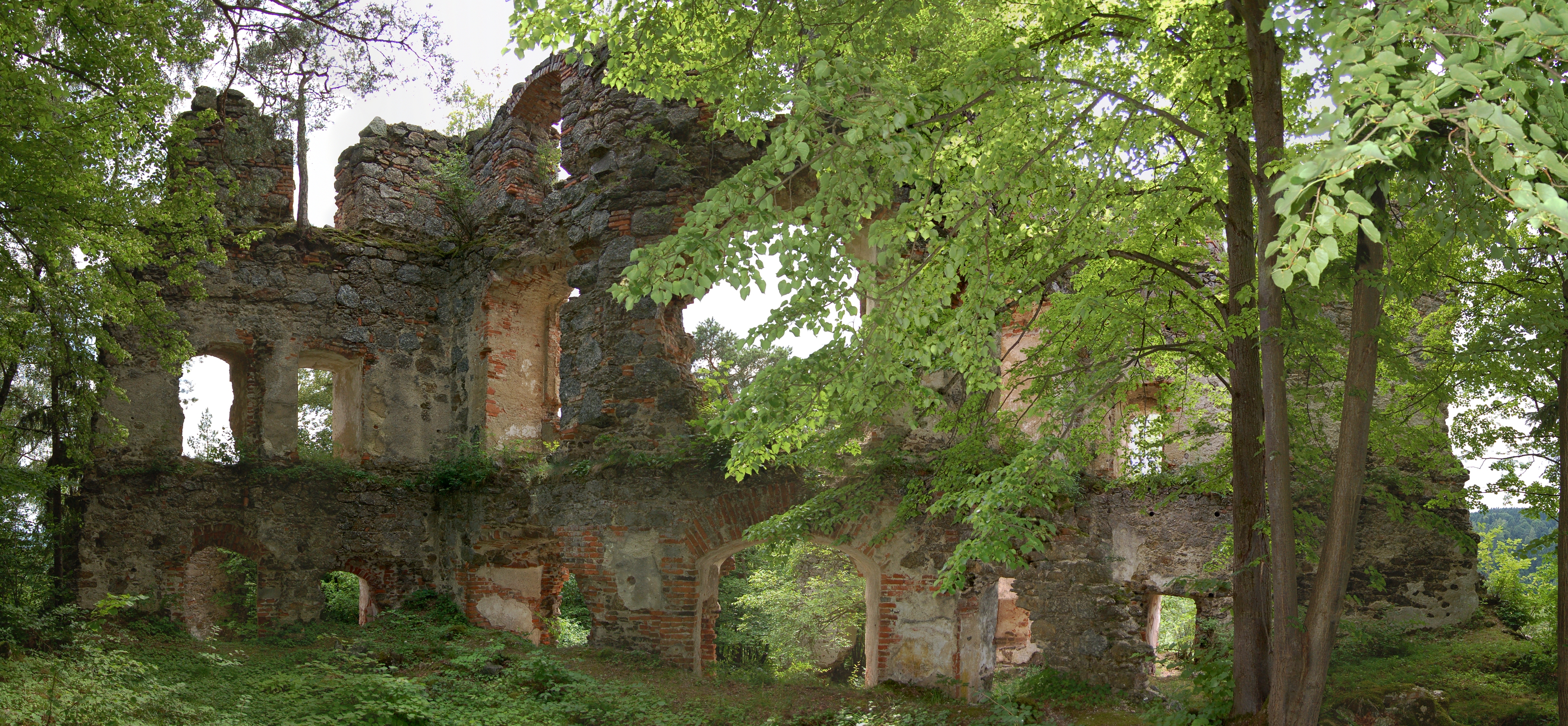 Die Ruine Oberwallsee in der Gemeinde Feldkirchen an der Donau im Bezirk Rohrbach (Oberösterreich).